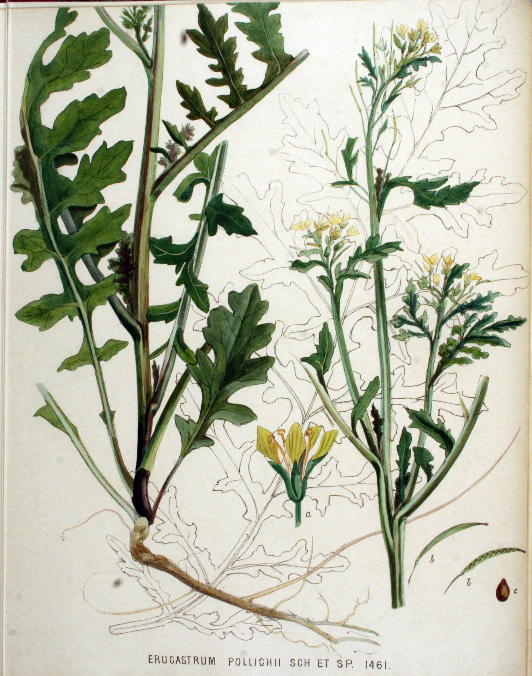 Erucastrum gallicum (Willd) O.E. Schulz (Syn. Erucastrum pollichii Schimp. & Spenner)